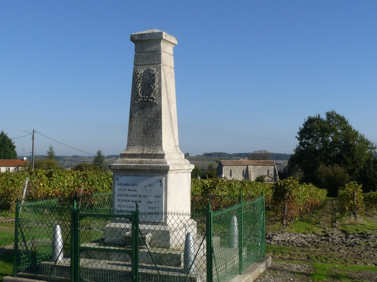 Monument aux morts de Polignac, Charente-Maritime, France